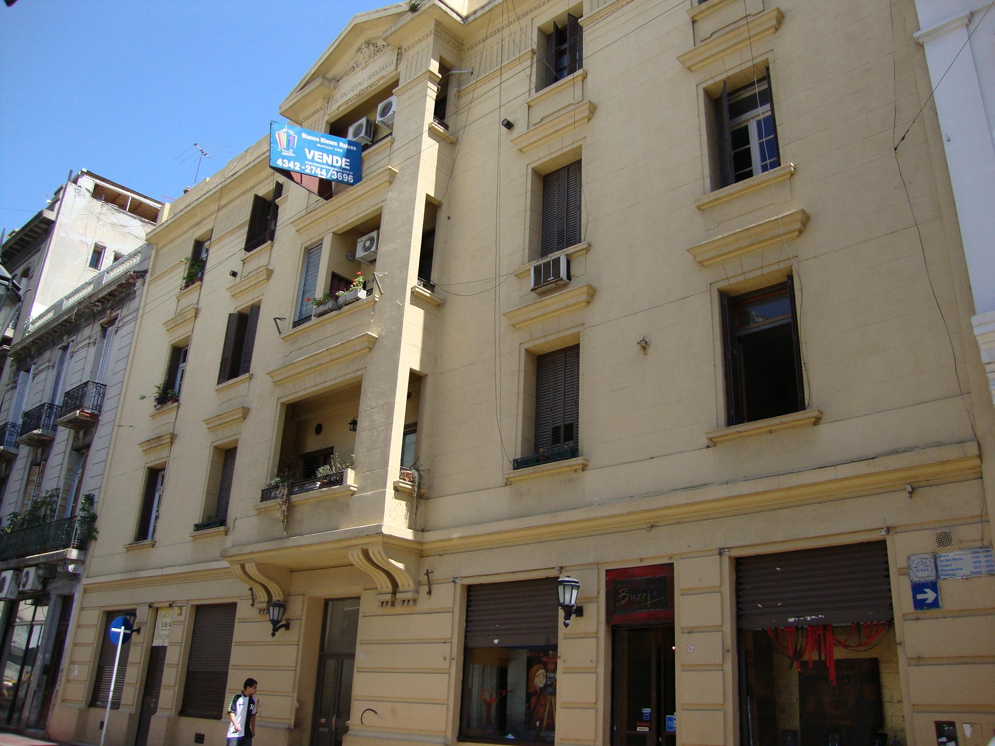 Edificio construido por la Comisión Nacional de Casas Baratas en 1921. En la calle Defensa, cerca de Avenida Independencia. San Telmo, Buenos Aires, Argentina.